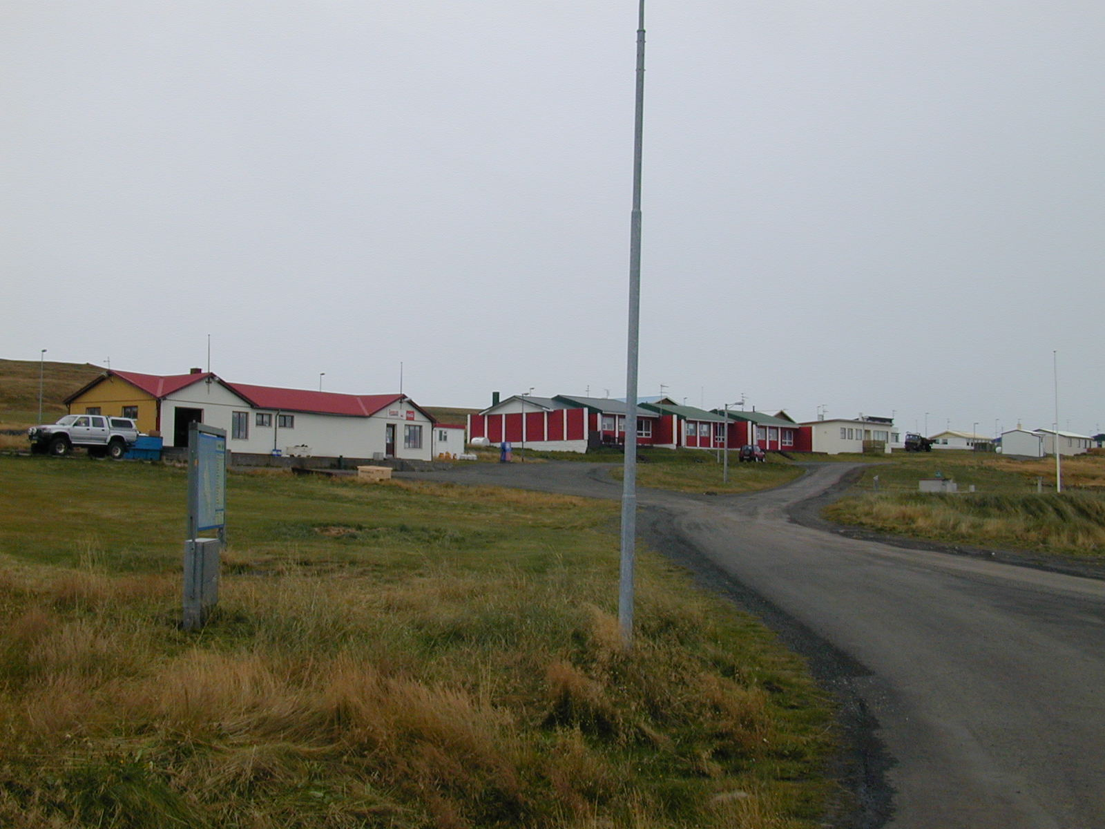 Þönglabakki auf Grímsey